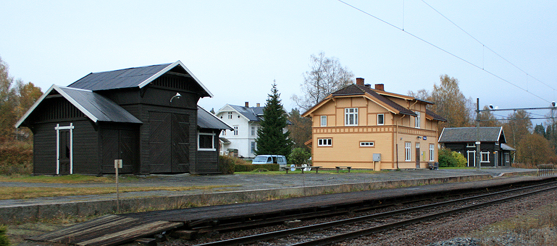 Reinsvoll stasjon, Gjøvikbanen. Bygd 1902. Arkitekt Paul Due. Fra v.: Privet, stasjonsbygning og uthus.